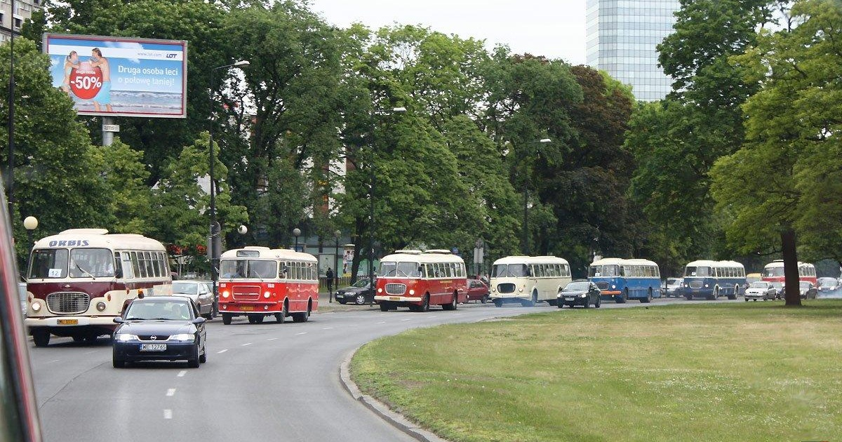 Ogórki opanowały Stolicę.